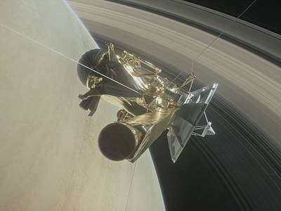 הגשושית קאסיני על שבתאי